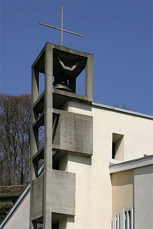 Lucens: Paroisse catholique